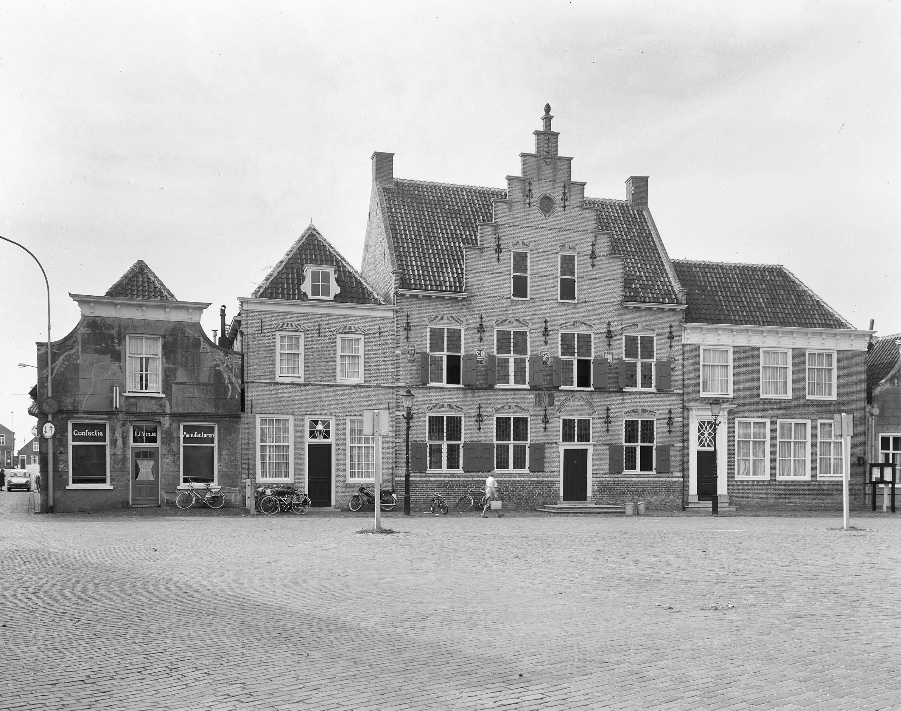 bij Raadhuis